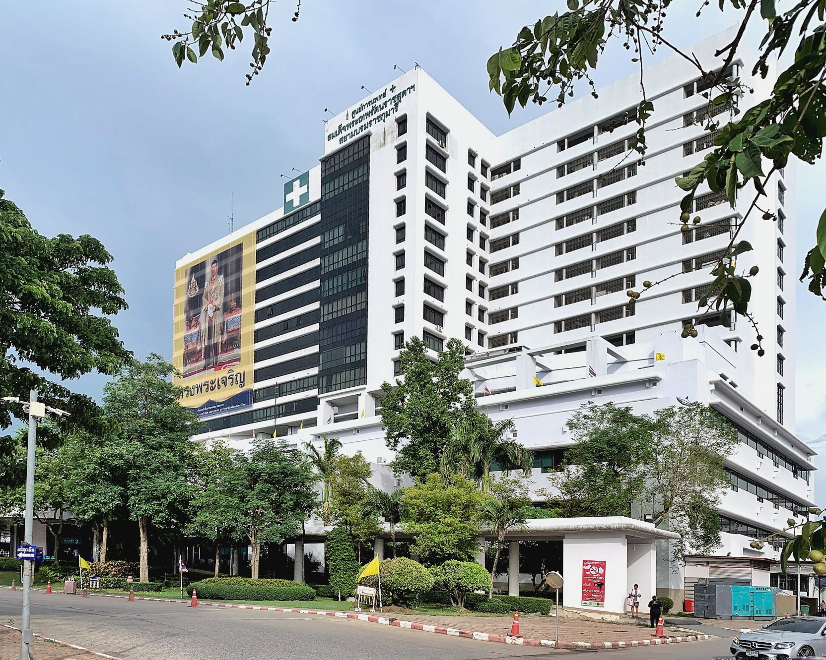 ศูนย์การแพทย์สมเด็จพระเทพฯ อำเภอองครักษ์ จังหวัดนครนายก โรงพยาบาลประจำคณะแพทยศาสตร์ มหาวิทยาลัยศรีนครินทร์วิโรฒ